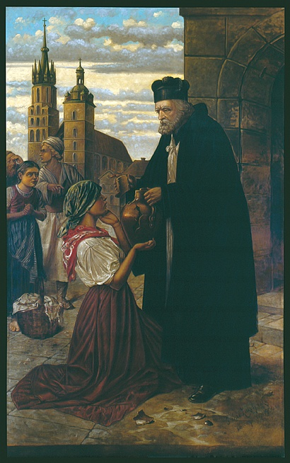 Święty Jan Kanty w Krakowie - Obraz ołtarzowy w kościele św. Jana Kantego w Chicago